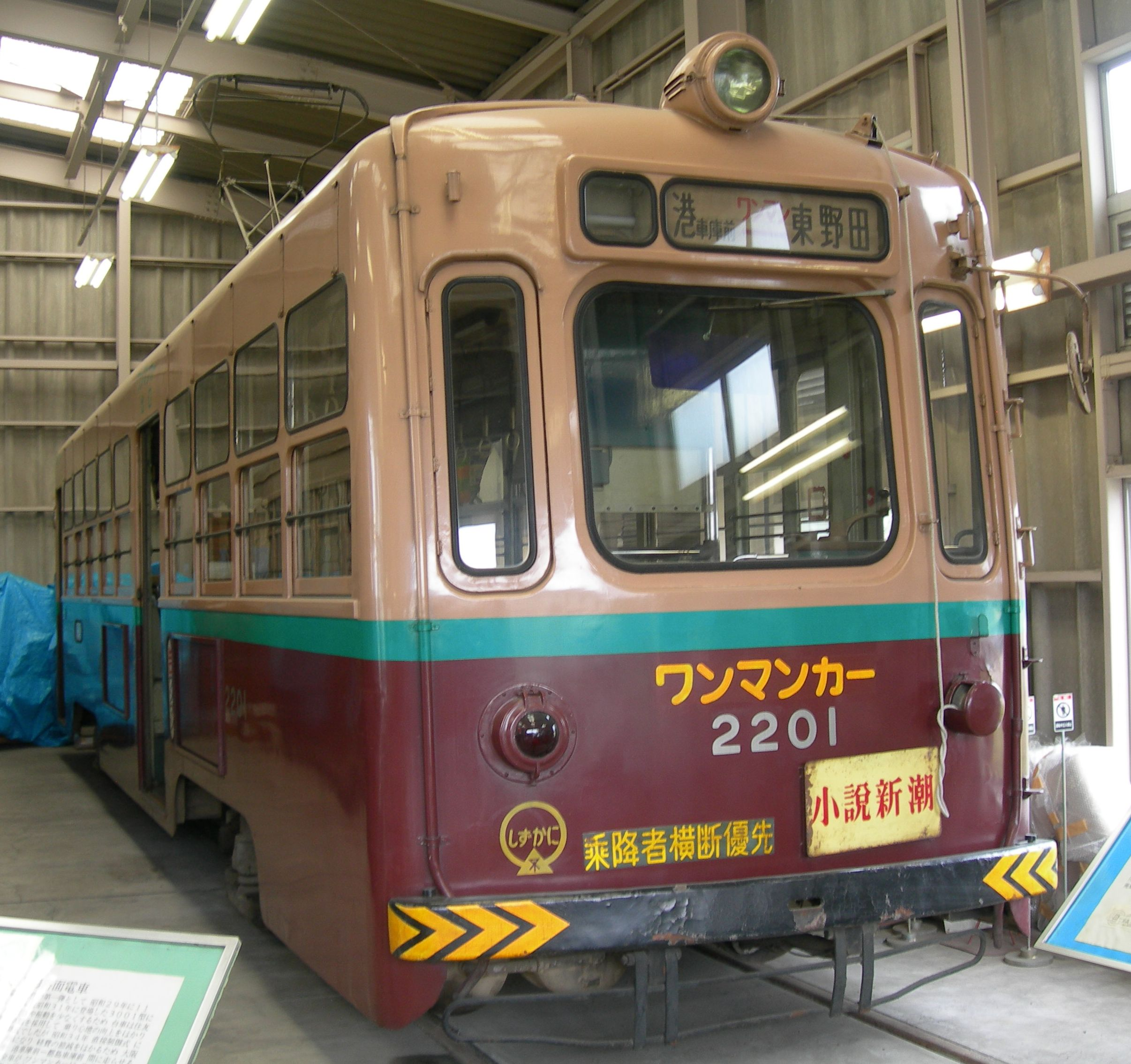 大阪市交通局2201形電車2201号、森ノ宮車両管理事務所内でイベント時に撮影。